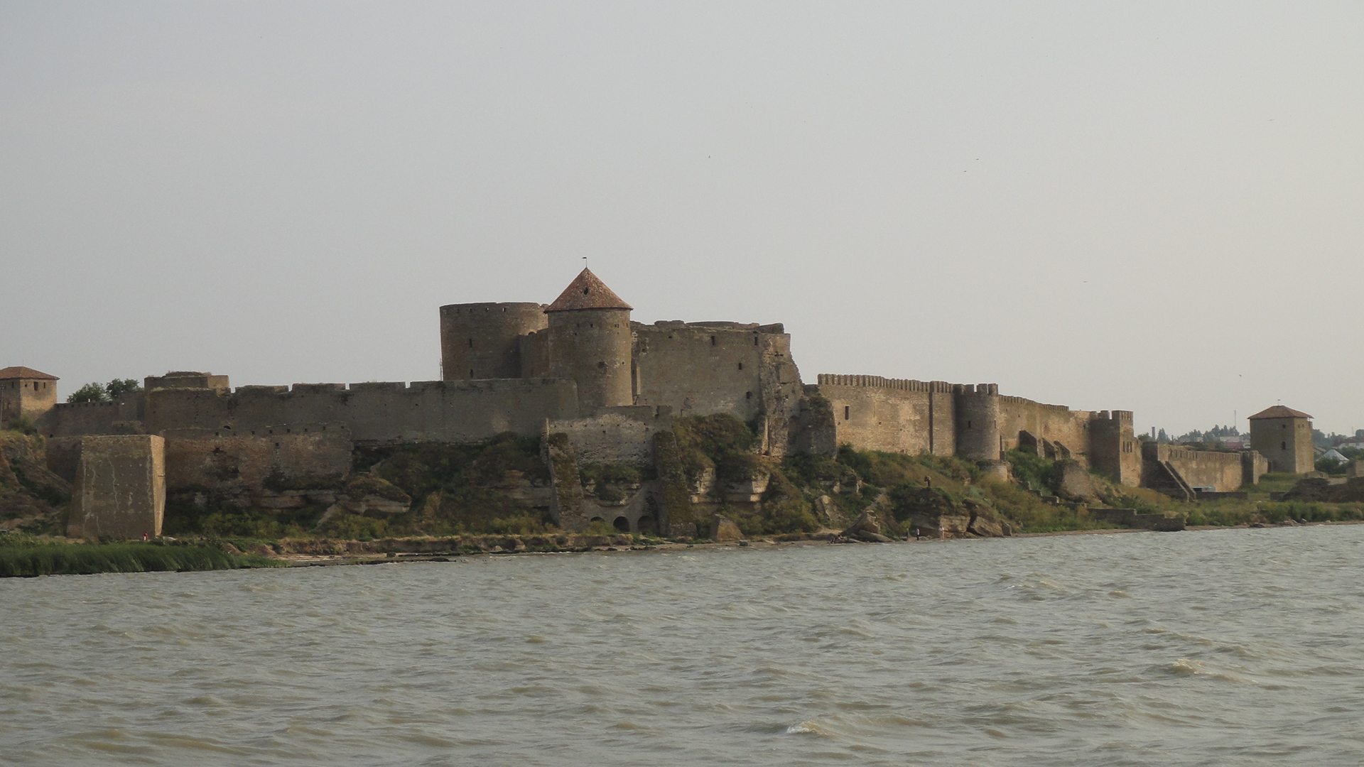 Вид с Днестровского лимана на Белгород-днестровскую крепость (Аккерман)